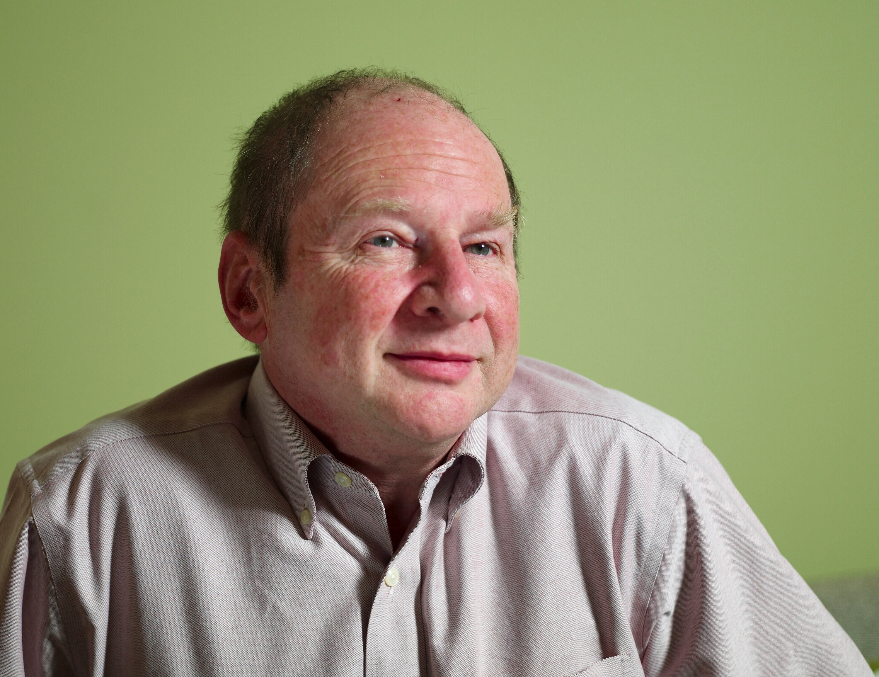 Hal Abelson